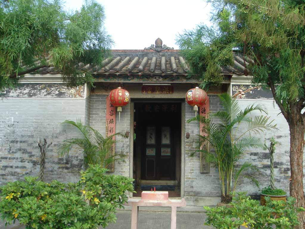 中文（香港）: 洪聖宮外觀。